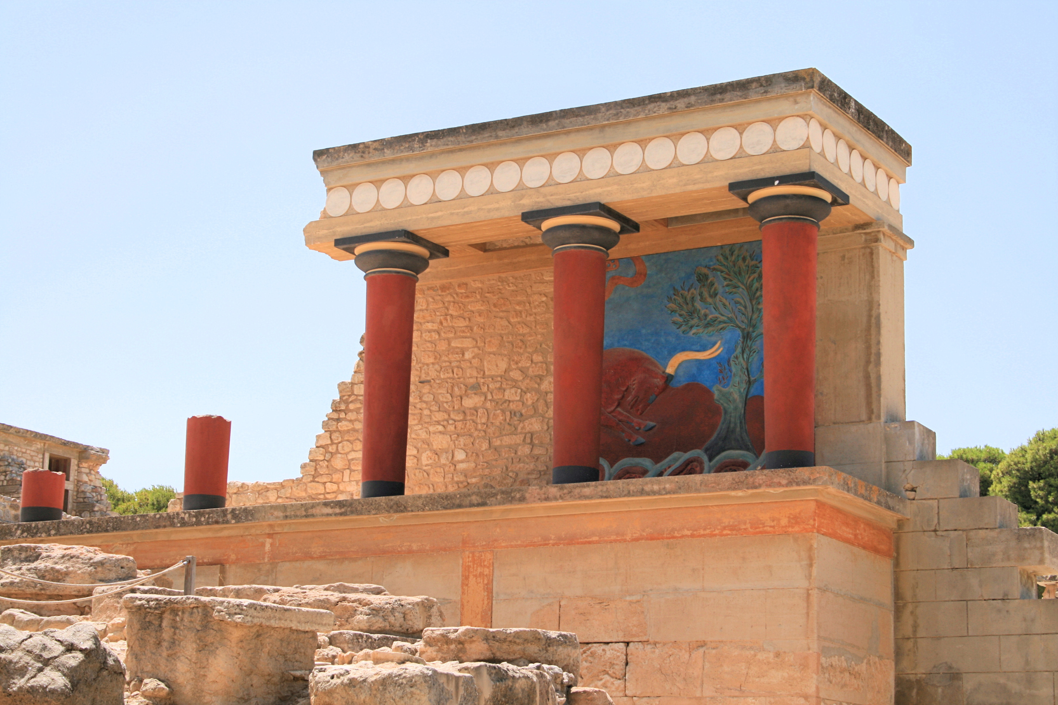 Minoischer Palast von Knossos auf der griechischen Insel Kreta / Das teilweise wiederhergestellte westliche Säulenvestibül des Korridors des Nordeingangs mit dem Relieffresko des Stiers